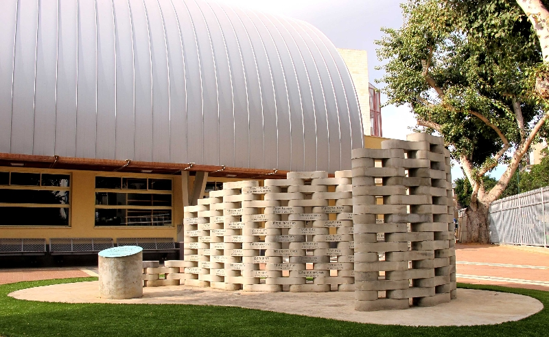 קיר זמן זיכרון – עירוני א’ תל אביב